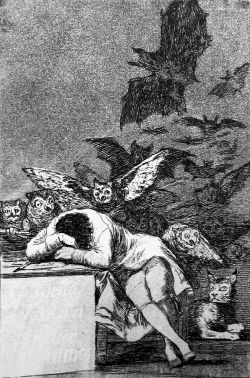 „Сънят на разума ражда чудовища”-Франсиско де Гоя